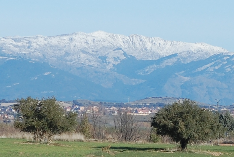 Pico de la Centenera (Sierra del Lobosillo)